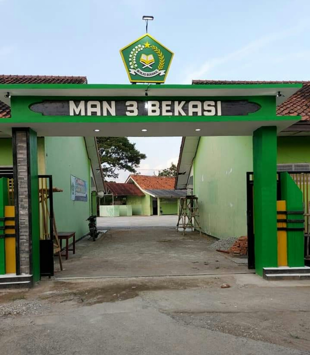 MAN 3 Bekasi